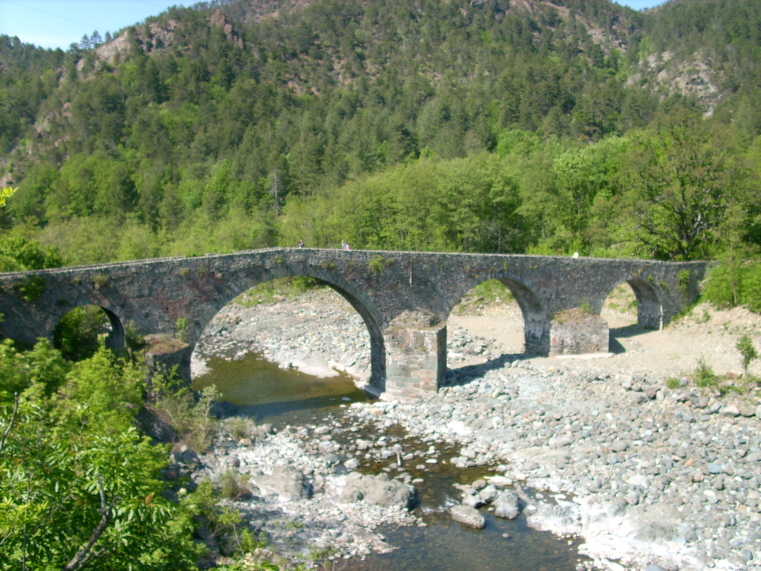 Ponte presso il torrente Orba presso Tiglieto, Liguria, Italia